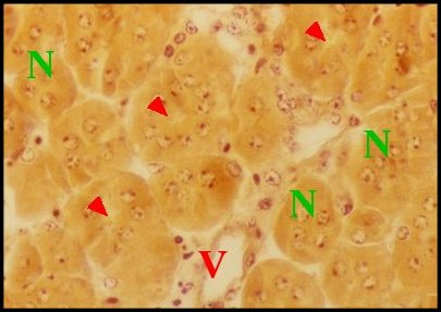 Autres détails (cellules) du tissu endocrinoïde de Mastophora cornigera, femelle adulte.